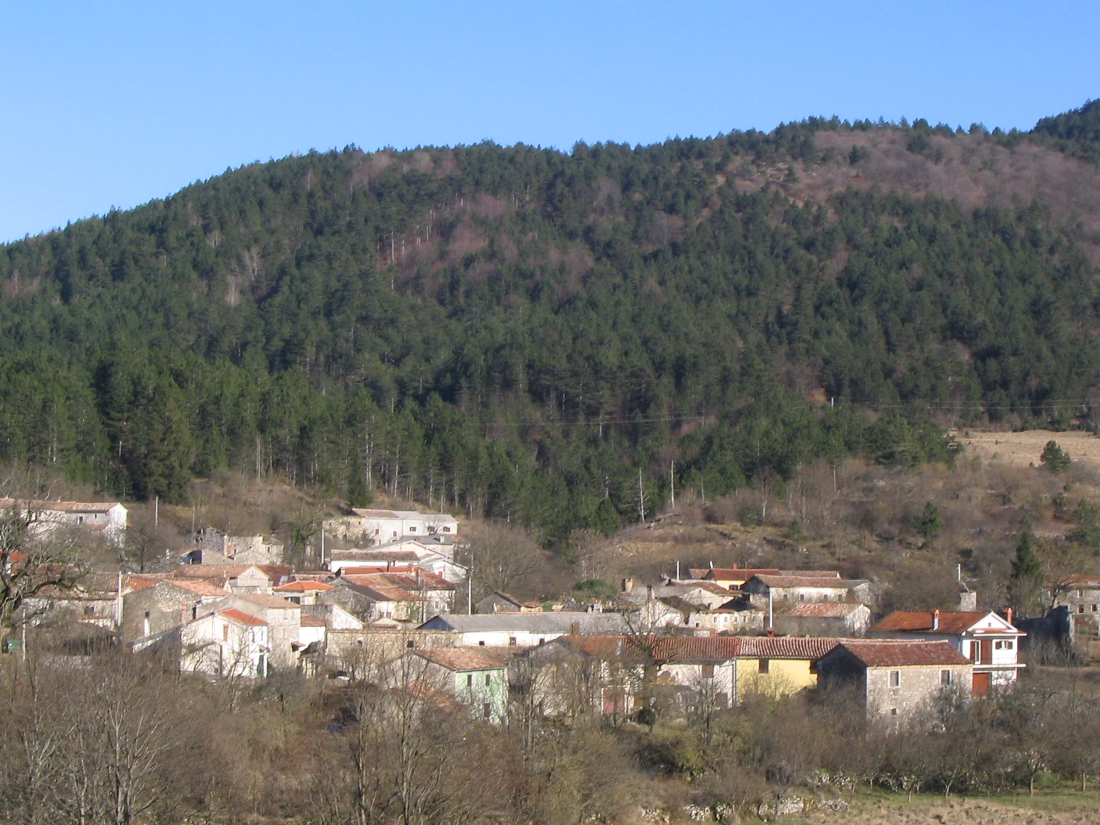 Dane, Istria, Croatia